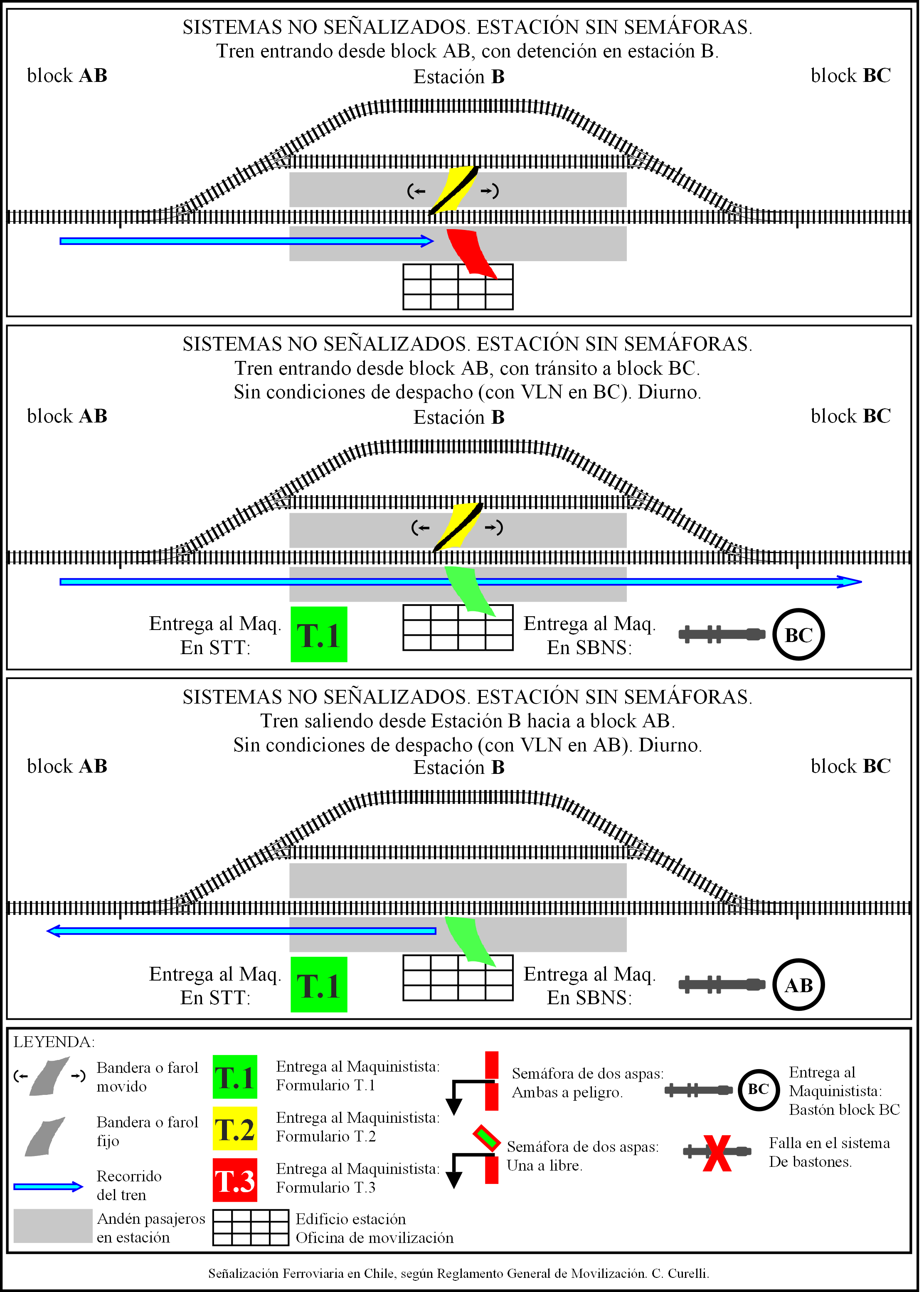 Esquema operaciones estaciones no señalizadas sin semáforas. Reglamento General de Movilización. Ferrocarriles del Estado (Chile).